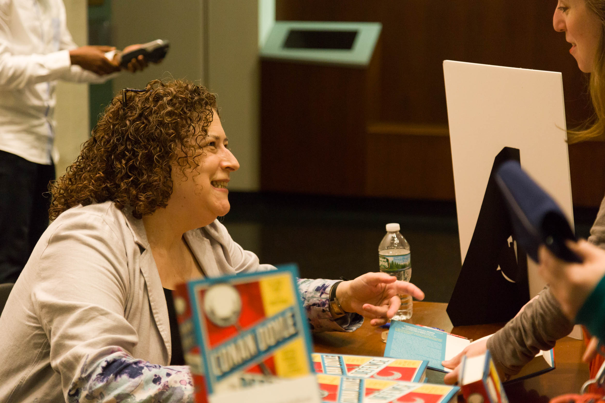 "First Person: Margalit Fox" held at the Center for Jewish History on October 15, 2018